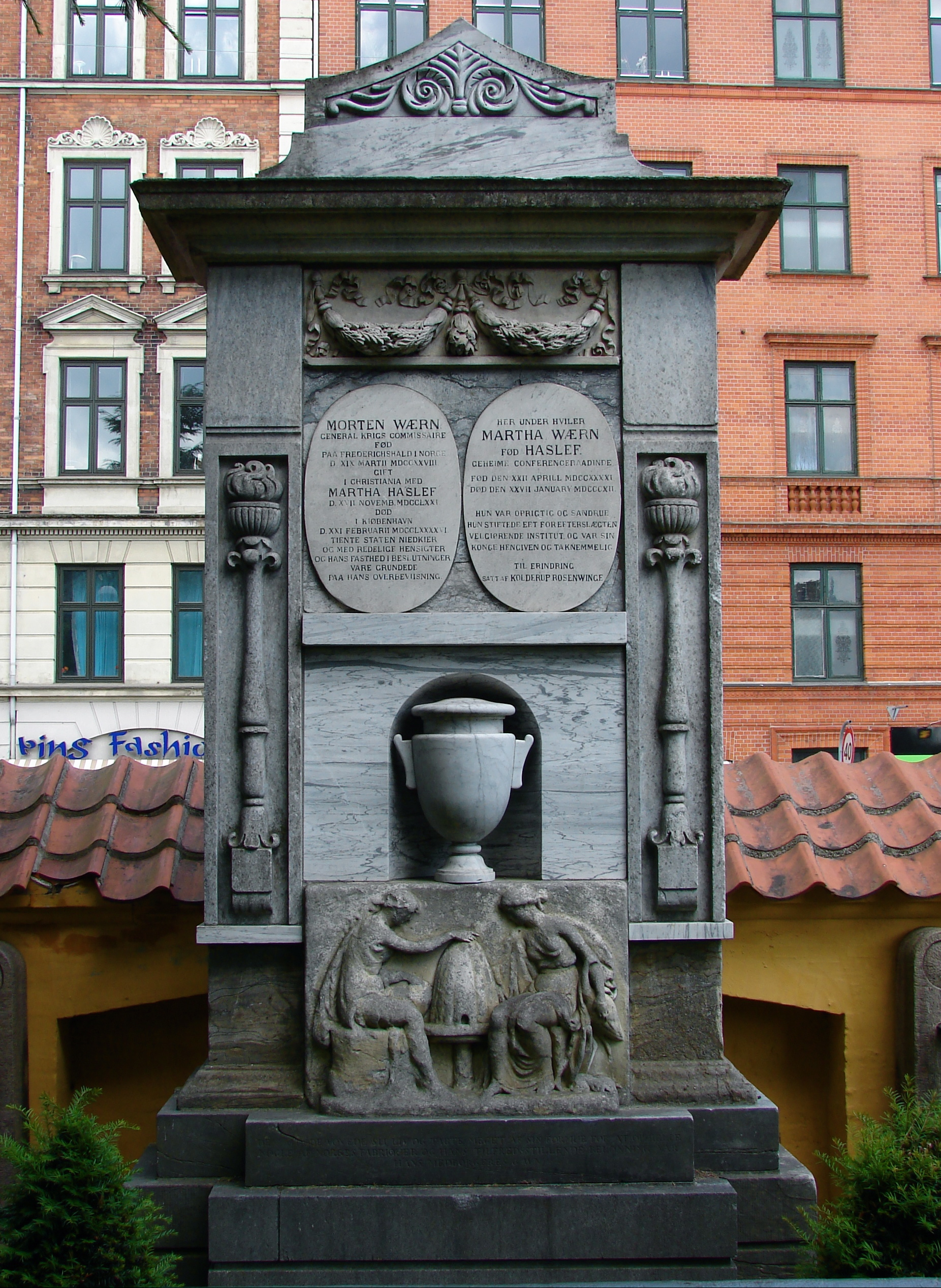 Gravminde (delvis restaureret) udført af Johannes Wiedewelt over General Krigs Comissaire Morten Wærn og hustru Martha født Haslef, Assistens kirkegård, Nørrebro, København